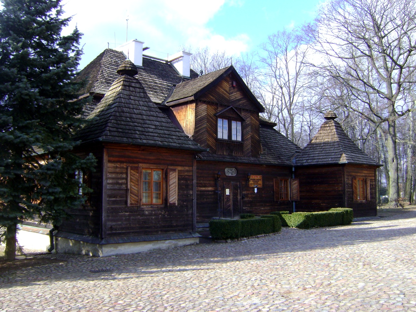 Drewniany dwór w Ożarowie, obecnie Muzeum Wnętrz Dworskich, oddział Muzeum Ziemi Wieluńskiej (zabytek nr 147/385 z 01.06.1967)